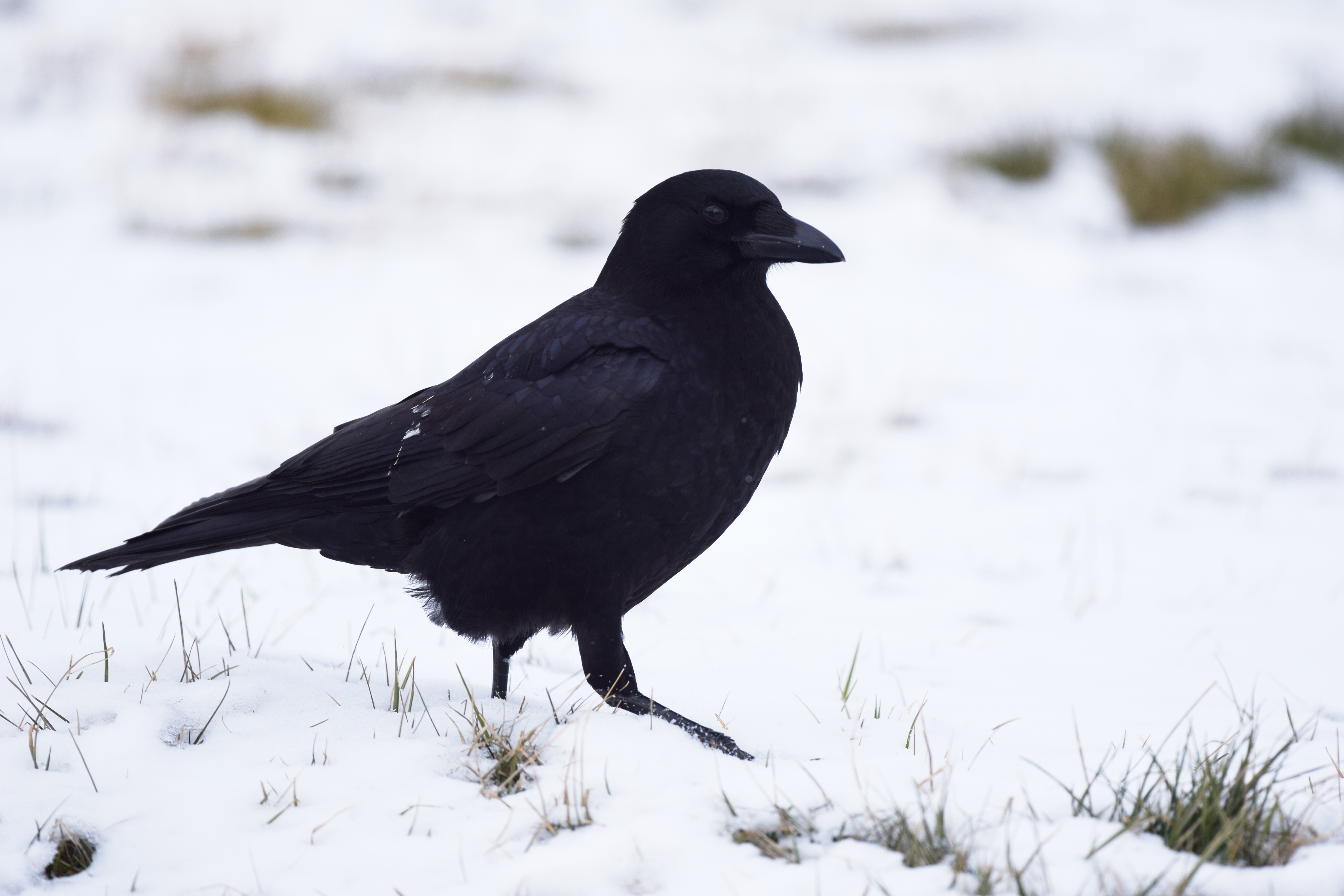 Carondelet Park 1/22/16